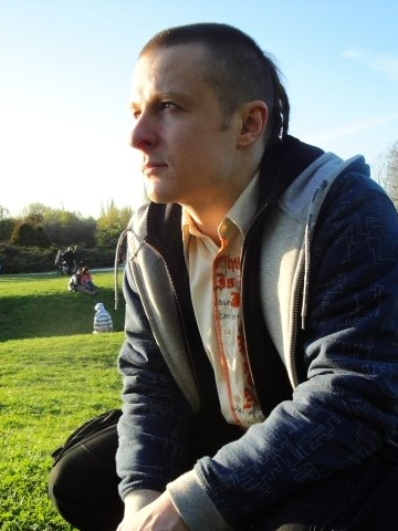 Marcin Orliński Polish poet and literary critic